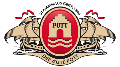 Das Logo der Marke Pott (Rum).